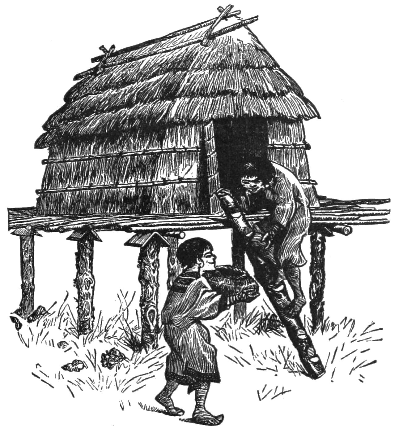 Ainu storehouse